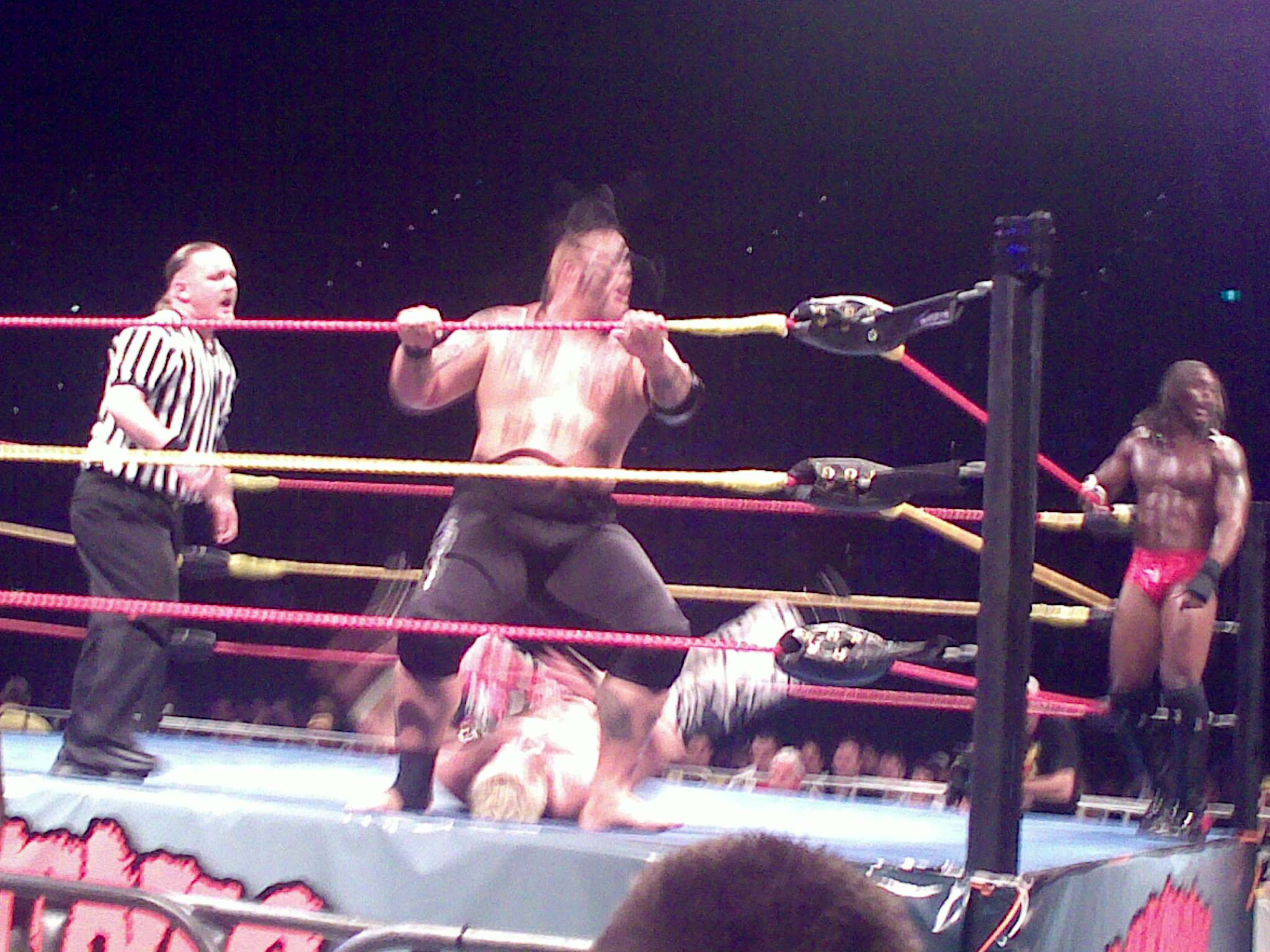 umaga